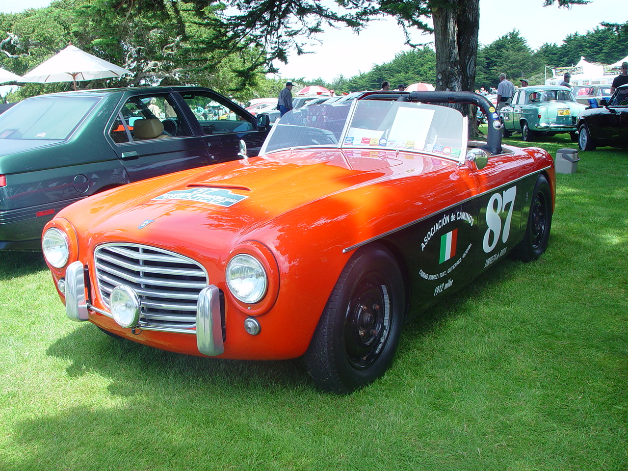 Siata Daina barchetta. Photograph taken at 2005 Concorso Italiano.